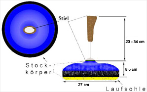 Ein Stock mit Einteilung in Stiel, Stockkörper und Platte sowie Größenangaben